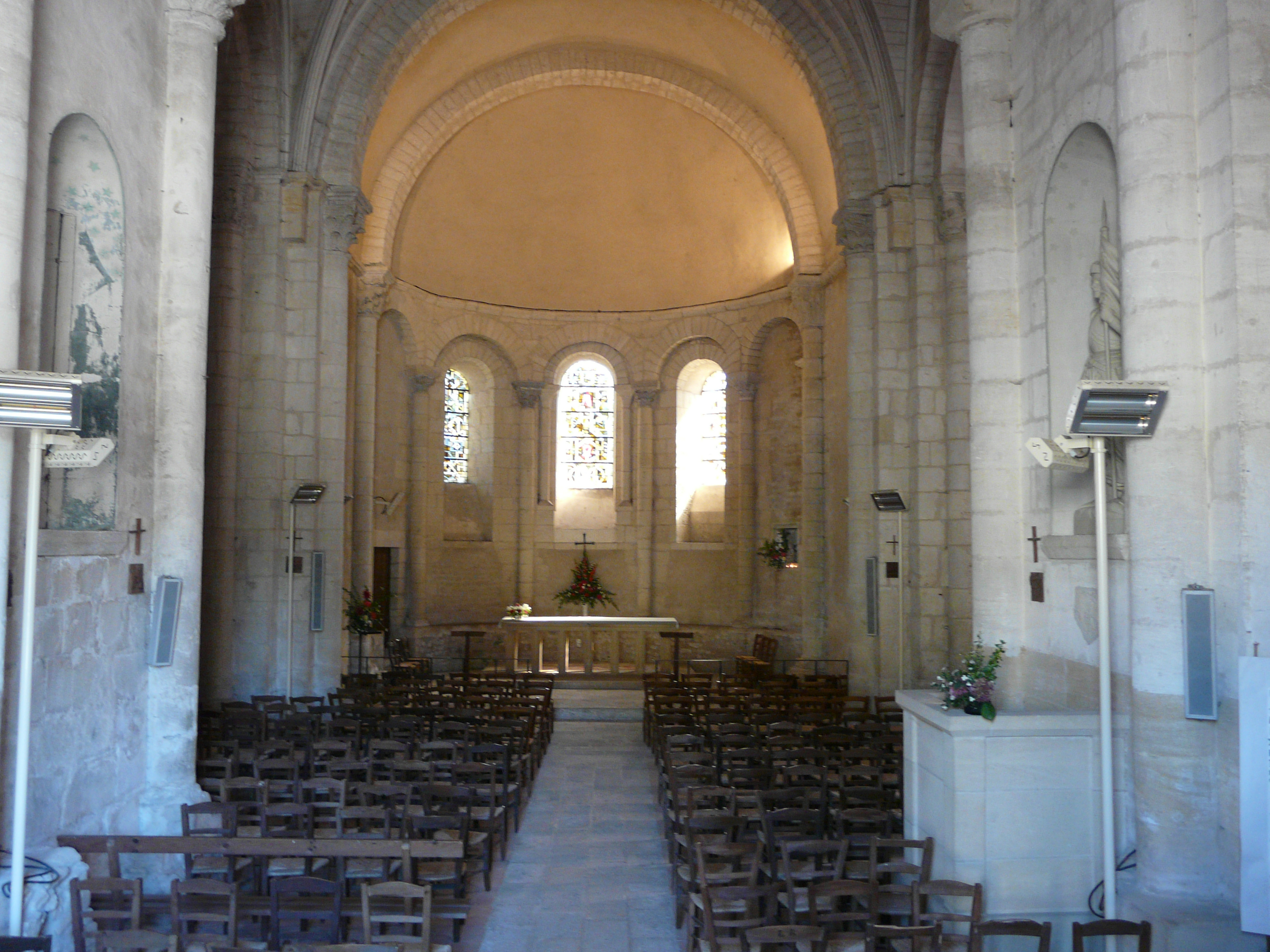 La nef de l'église Saint-Pierre-ès-Liens, Montcaret, Dordogne, France.